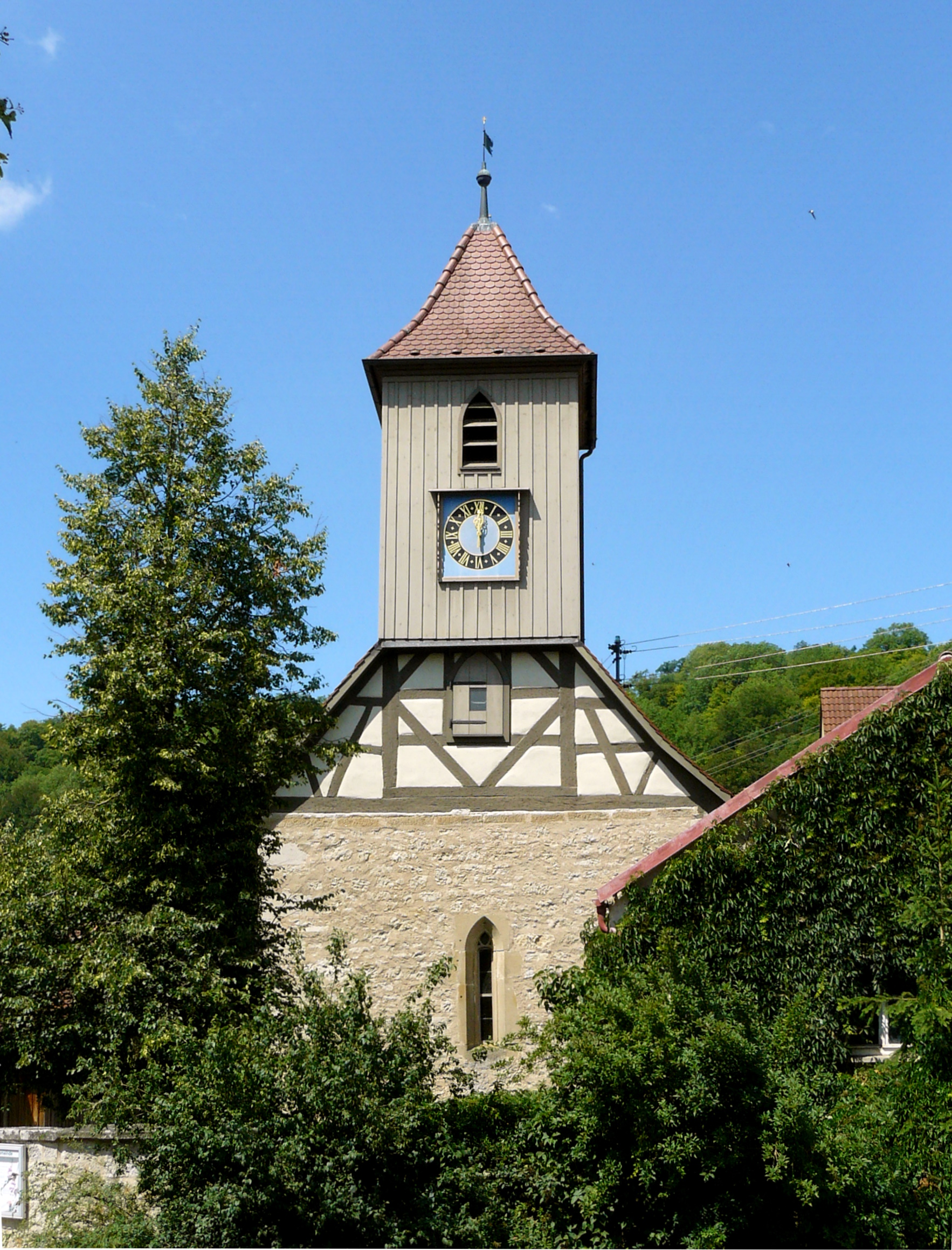 Nikolauskirche in Mistlau, Gemeinde Kirchberg an der Jagst